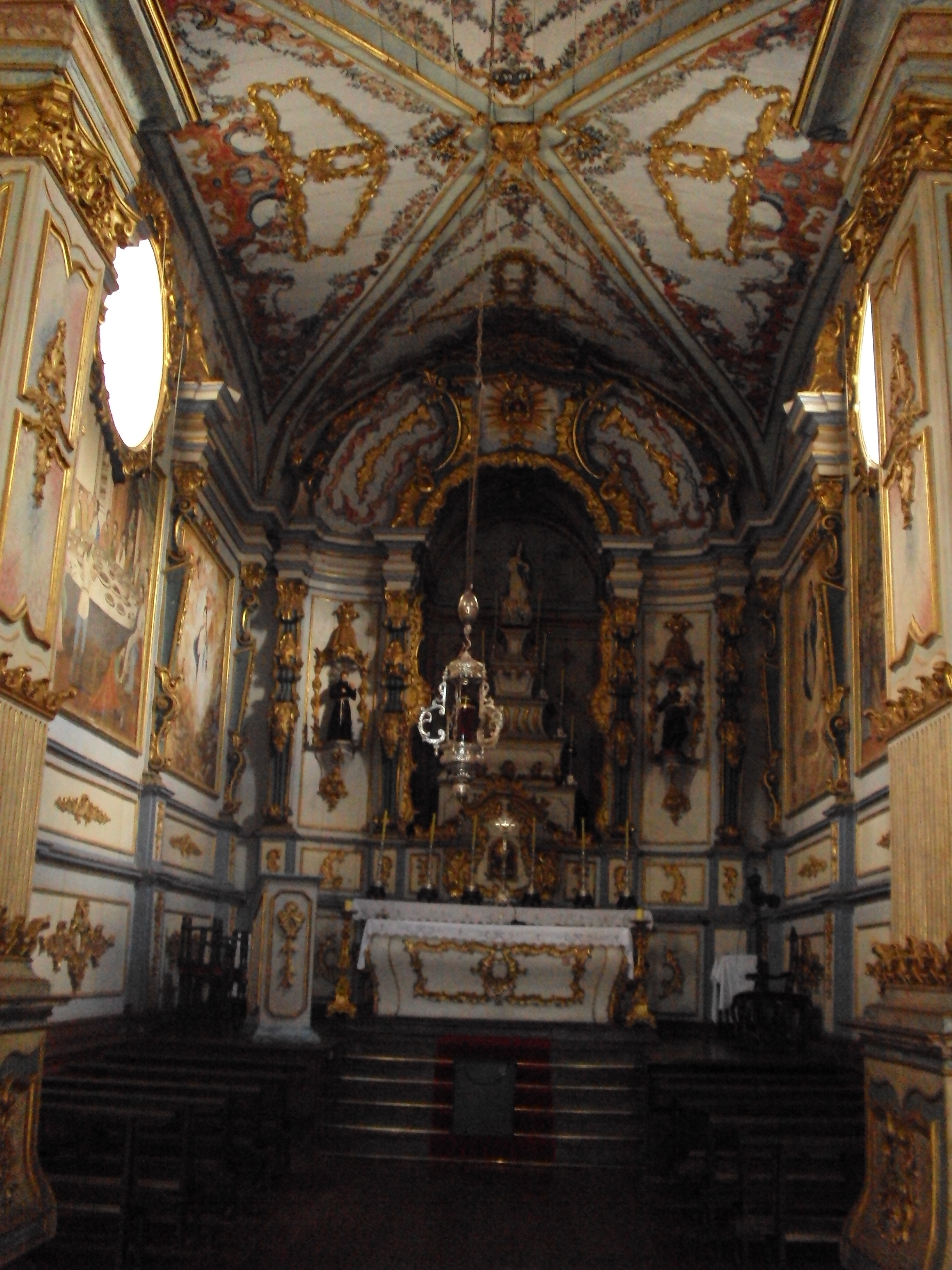 Detalhe da nave, teto e do altar da Igreja Matriz Nossa Senhora da Conceição, Prados_MG (2014)